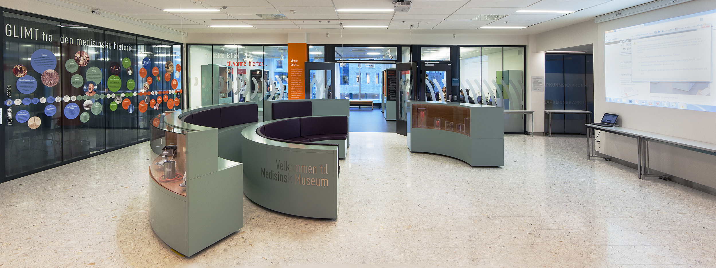 Medisinsk museum i Trondheim. Offisielt åpnet i januar 2014